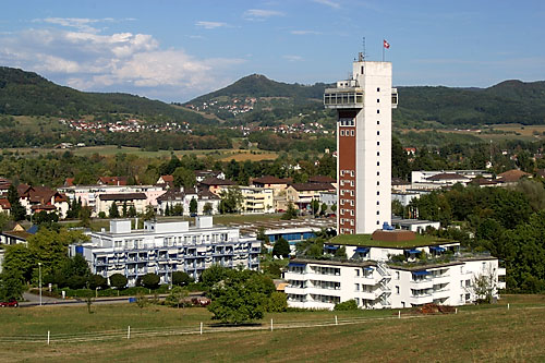 Das Thermalbad von Zurzach mit dem markanten Turmhotel